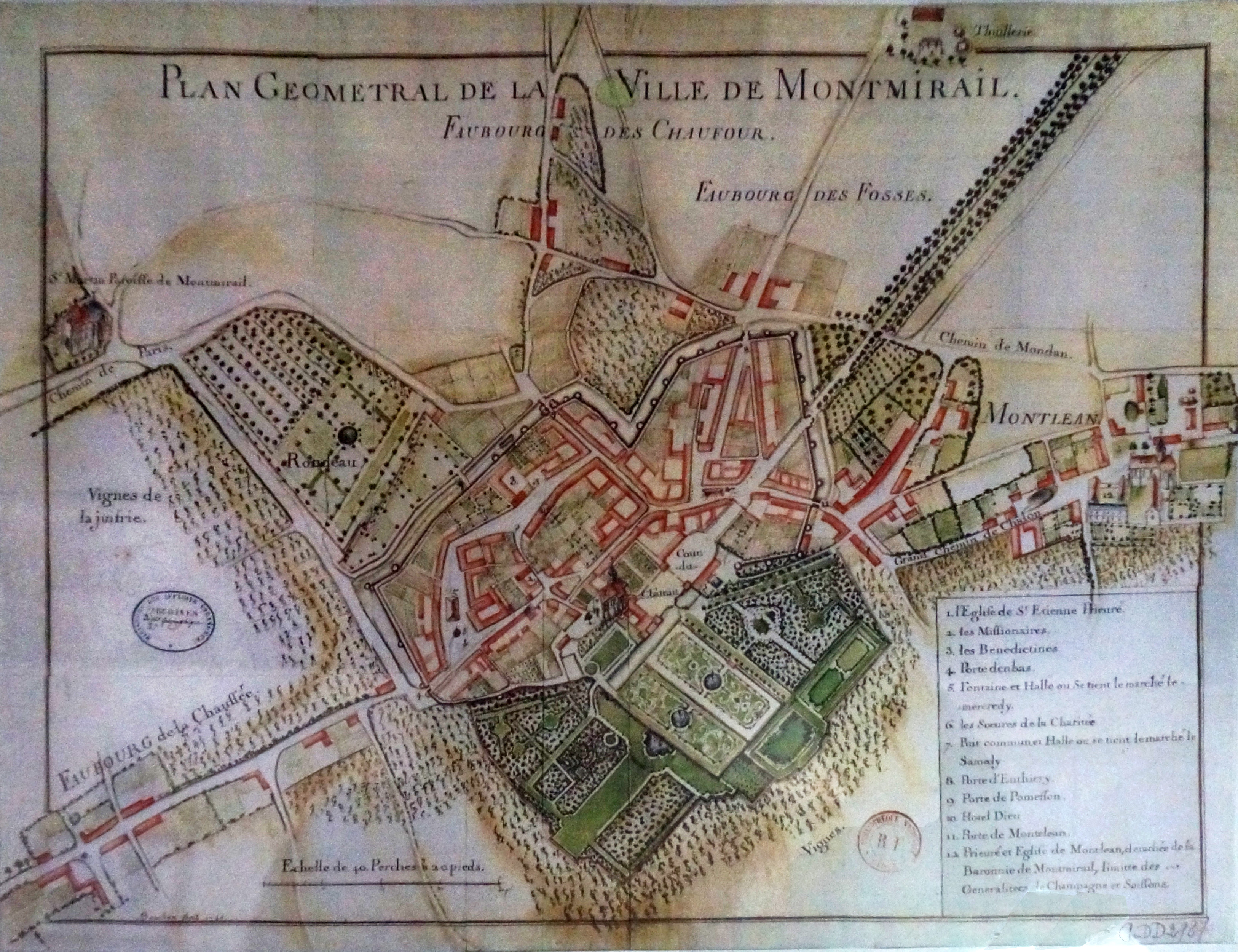 Plan de Montmirail sans date mais peut-être avant le XIXe siècle.